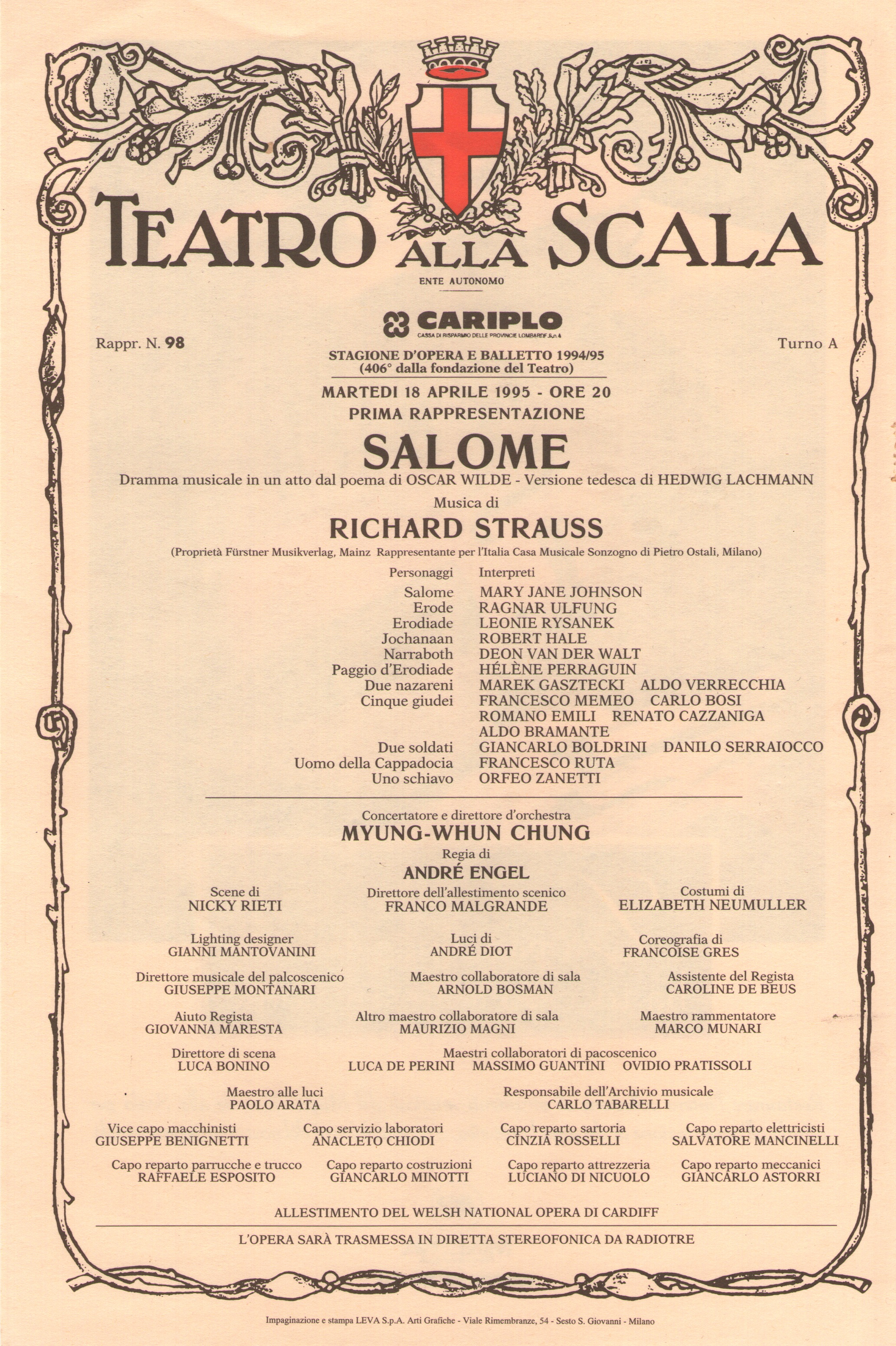 plakat spektaklu